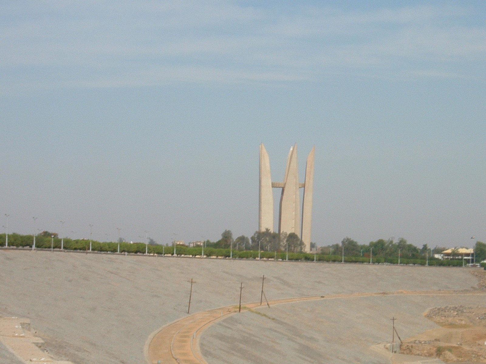 Foto del lato nord della diga di Assuan con sullo sfondo il Memoriale dell'amicizia Egiziano-Sovietico E' una foto scattata da me